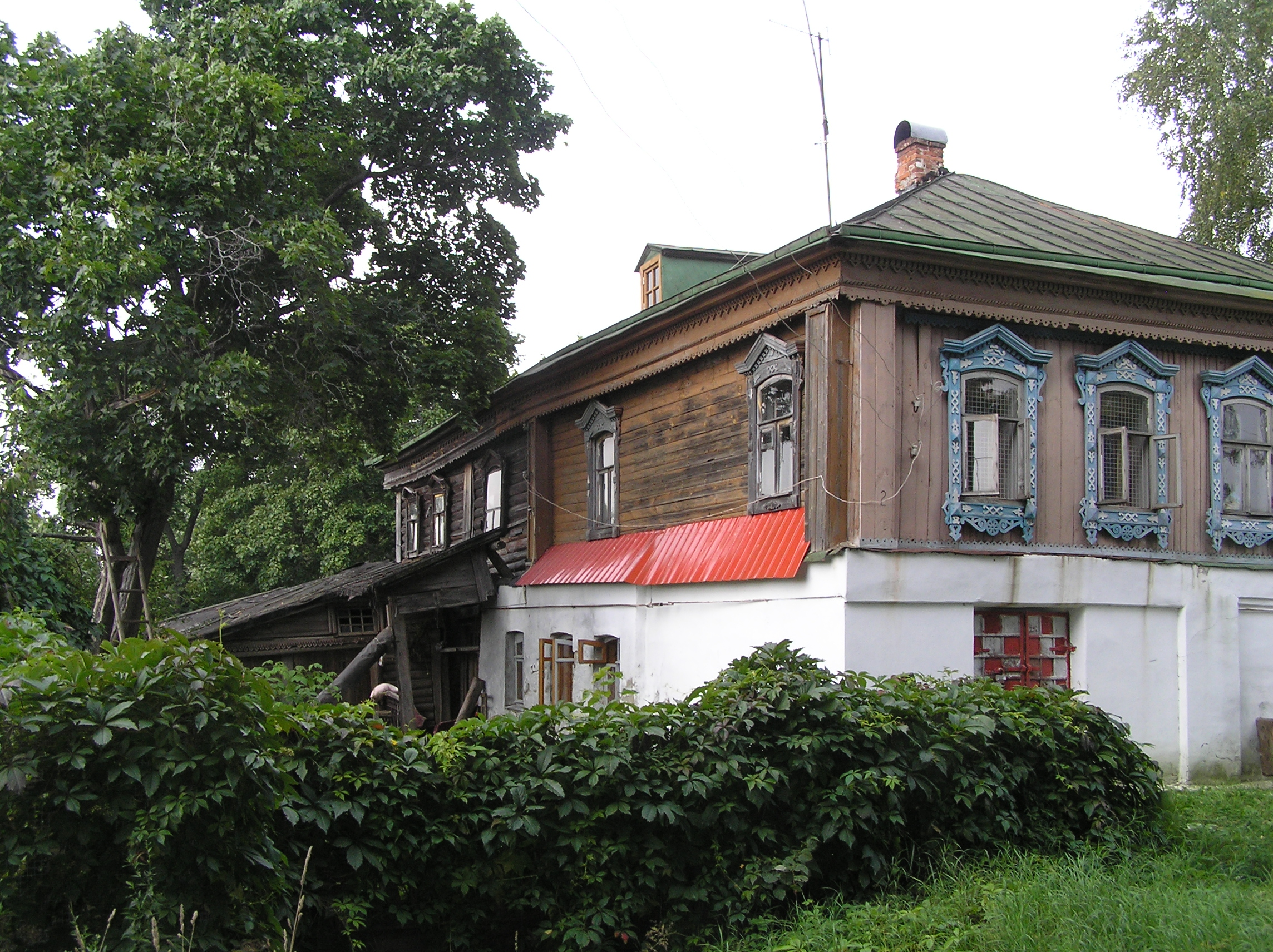 Дом великого русского писателя В.А.Солоухина в селе Алепино. Именно в этом доме Солоухин родился и прожил многие годы. Похоронен недалеко от дома, на сельском кладбище.